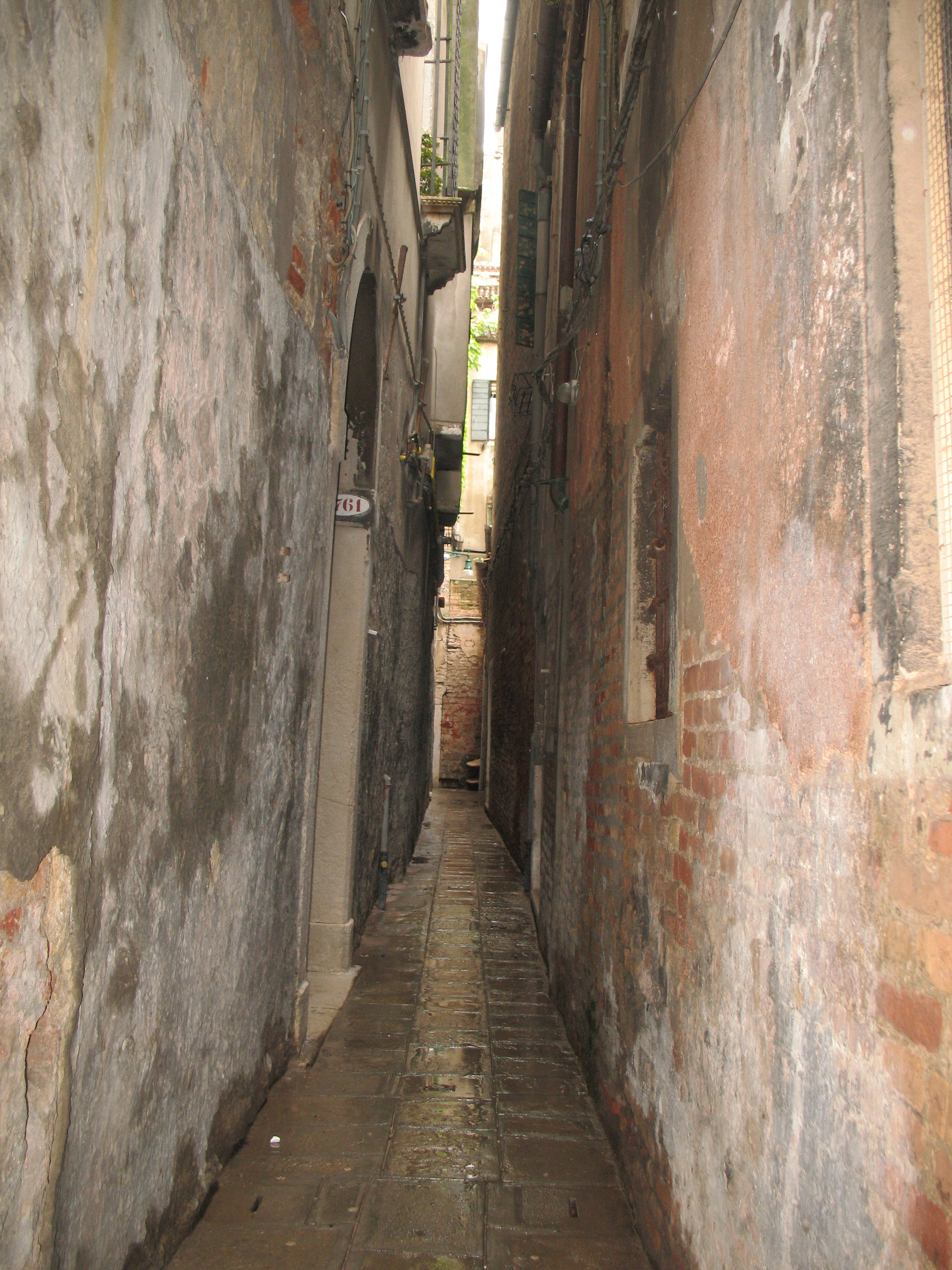 Die Calle Corner hinter den Palazzi Barbarigo della Terrazza und Pisani Moretta